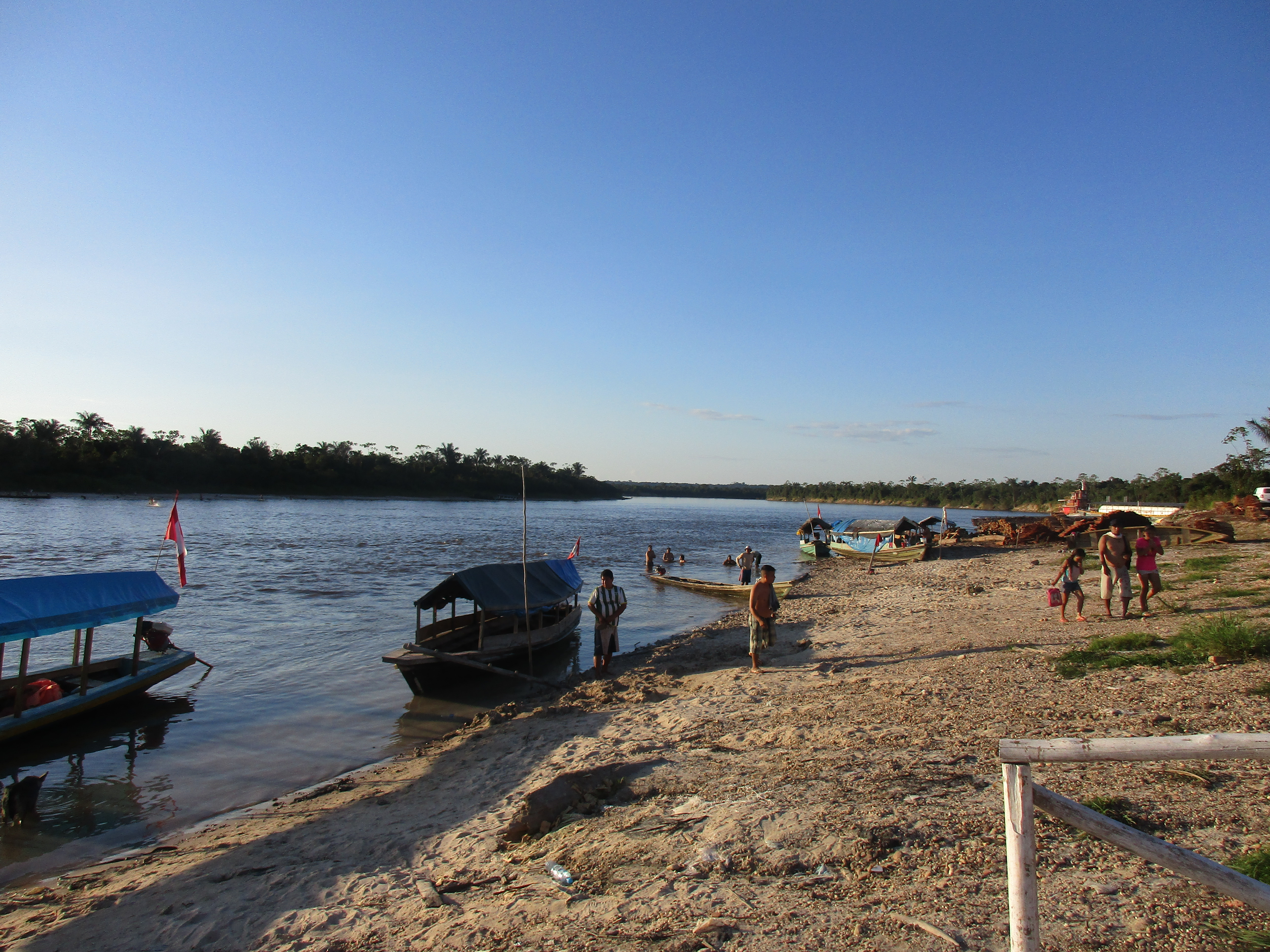 Puerto de Santa Clara en el río Nanay